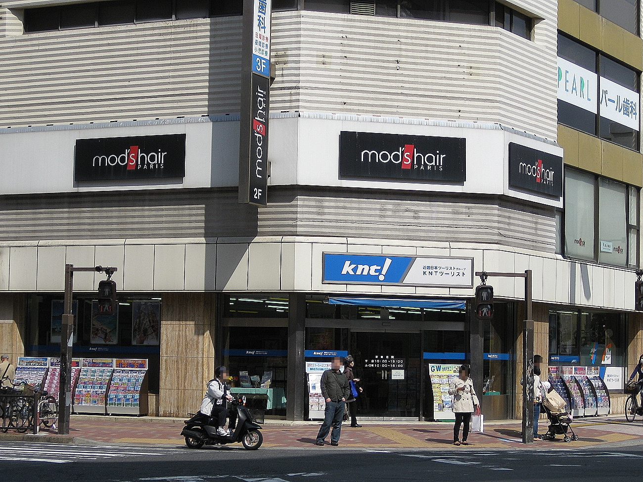 KNTツーリスト 船橋営業所 （正面） （現：近畿日本ツーリスト個人旅行(株)船橋営業所）（千葉県船橋市）